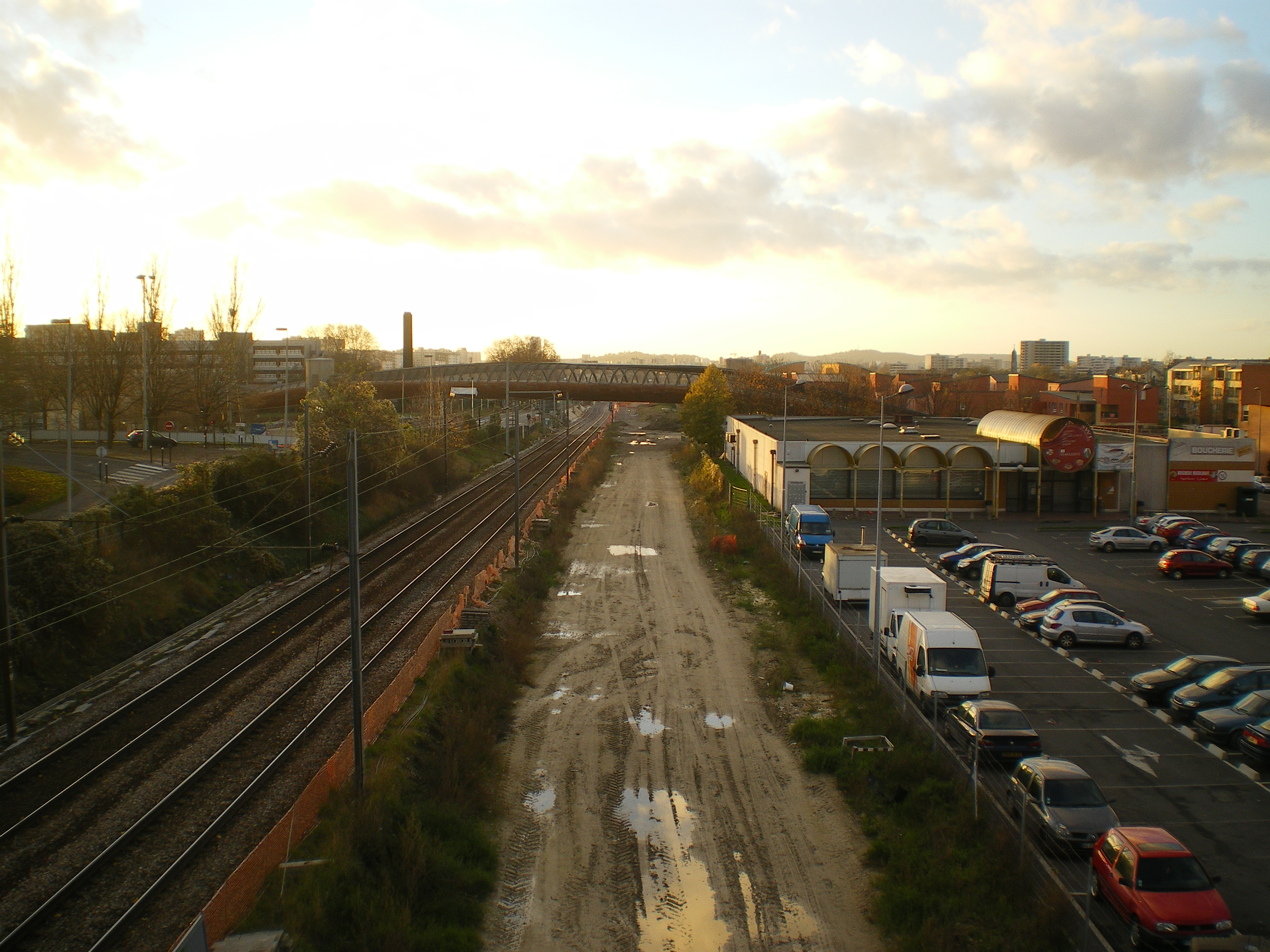 Travaux de la tangentielle nord novembre 2012